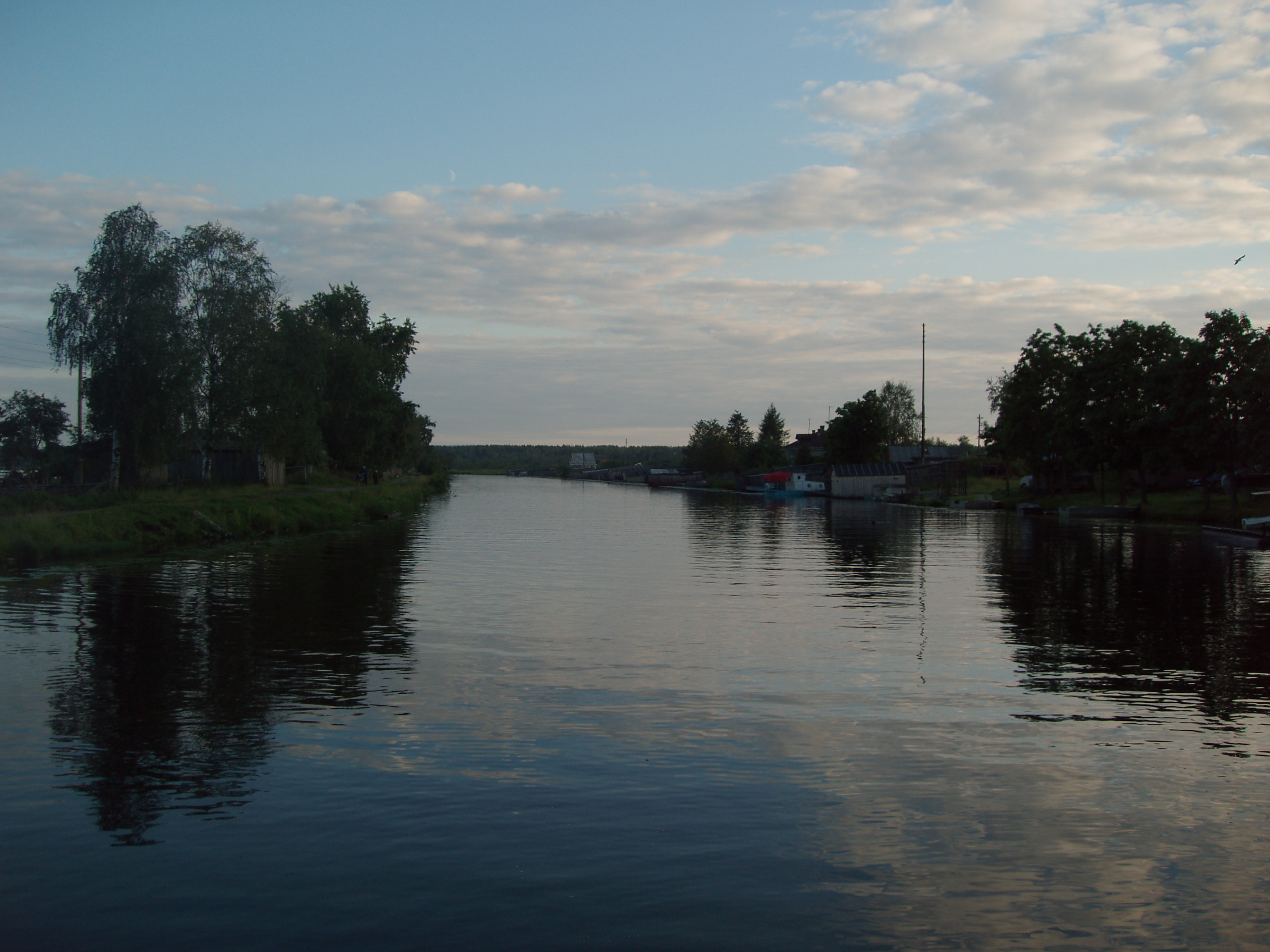 Онежский канал